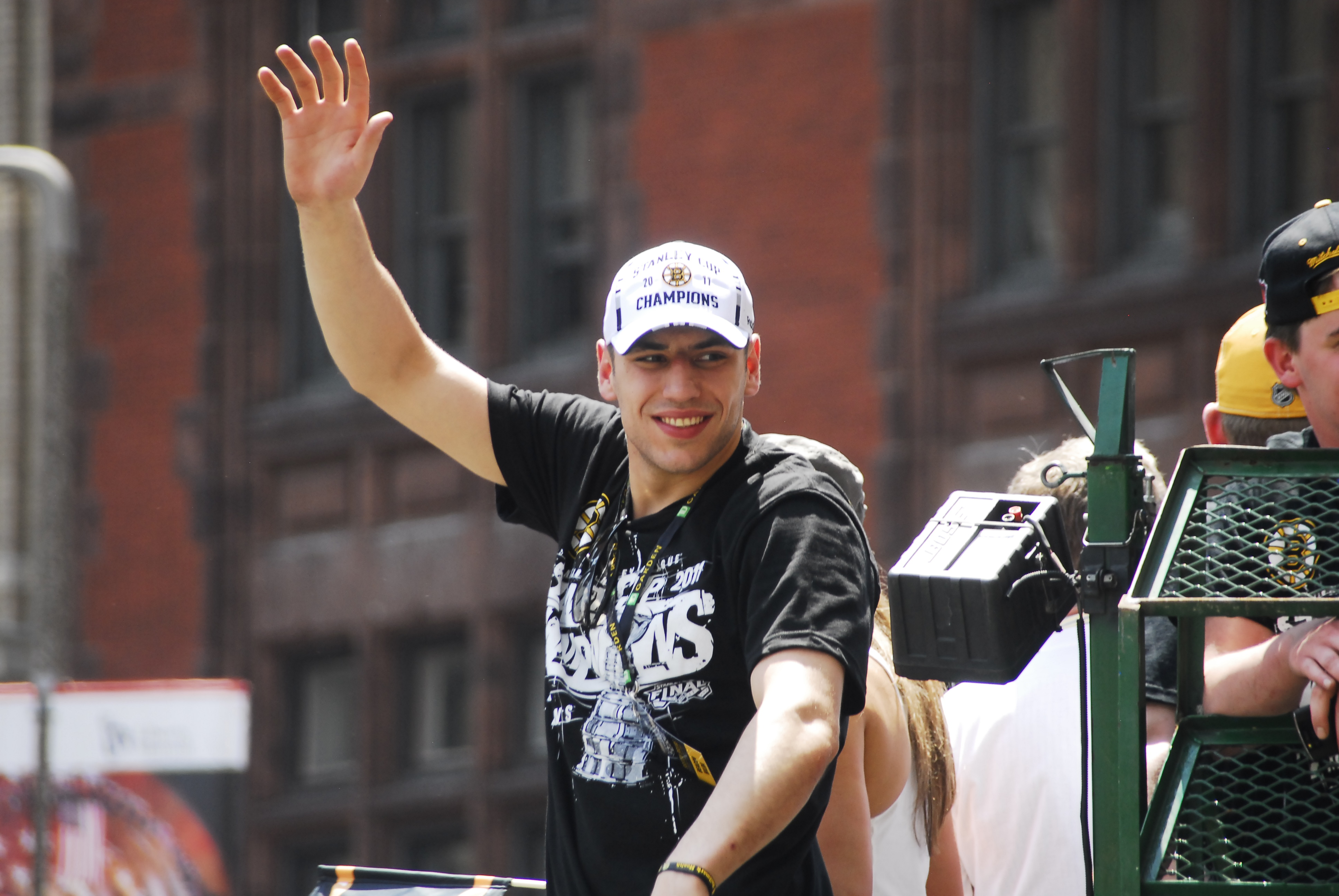 _ERI6473